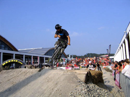 Enhver, der har lært at cykle, har mestret homøostasens kunst.